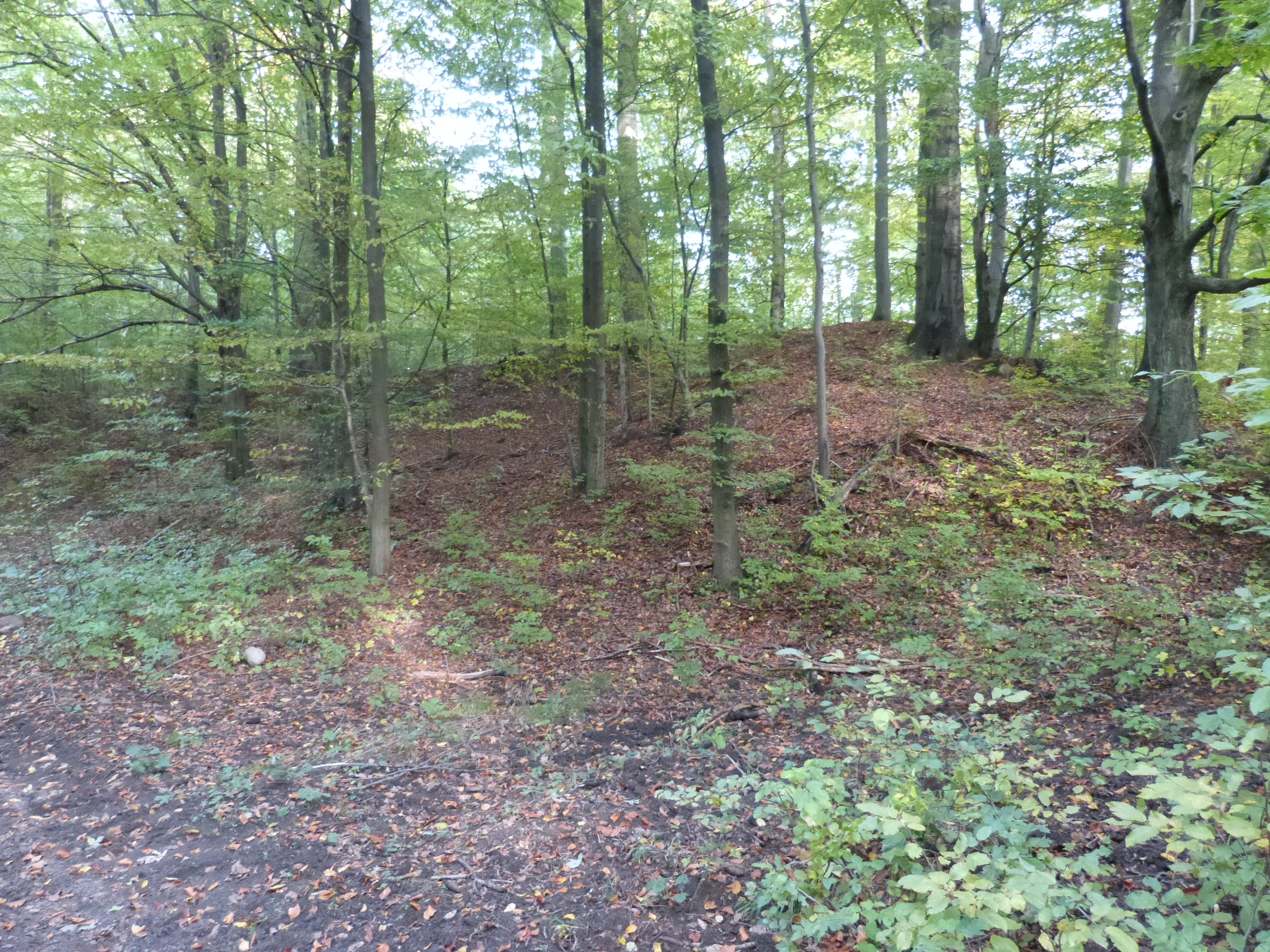 Popielewo - pozostałości średniowiecznego zamku